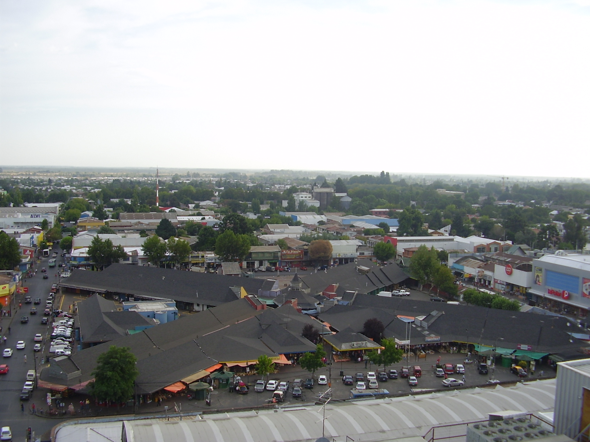 Vista panoramica al mercado de Chillán desde el edificio mall plaza el roble de chillán, la provincia de Ñuble rica en agricultura, ganaderia. El mercado ofrece precios bajos de horario continuado los días legales